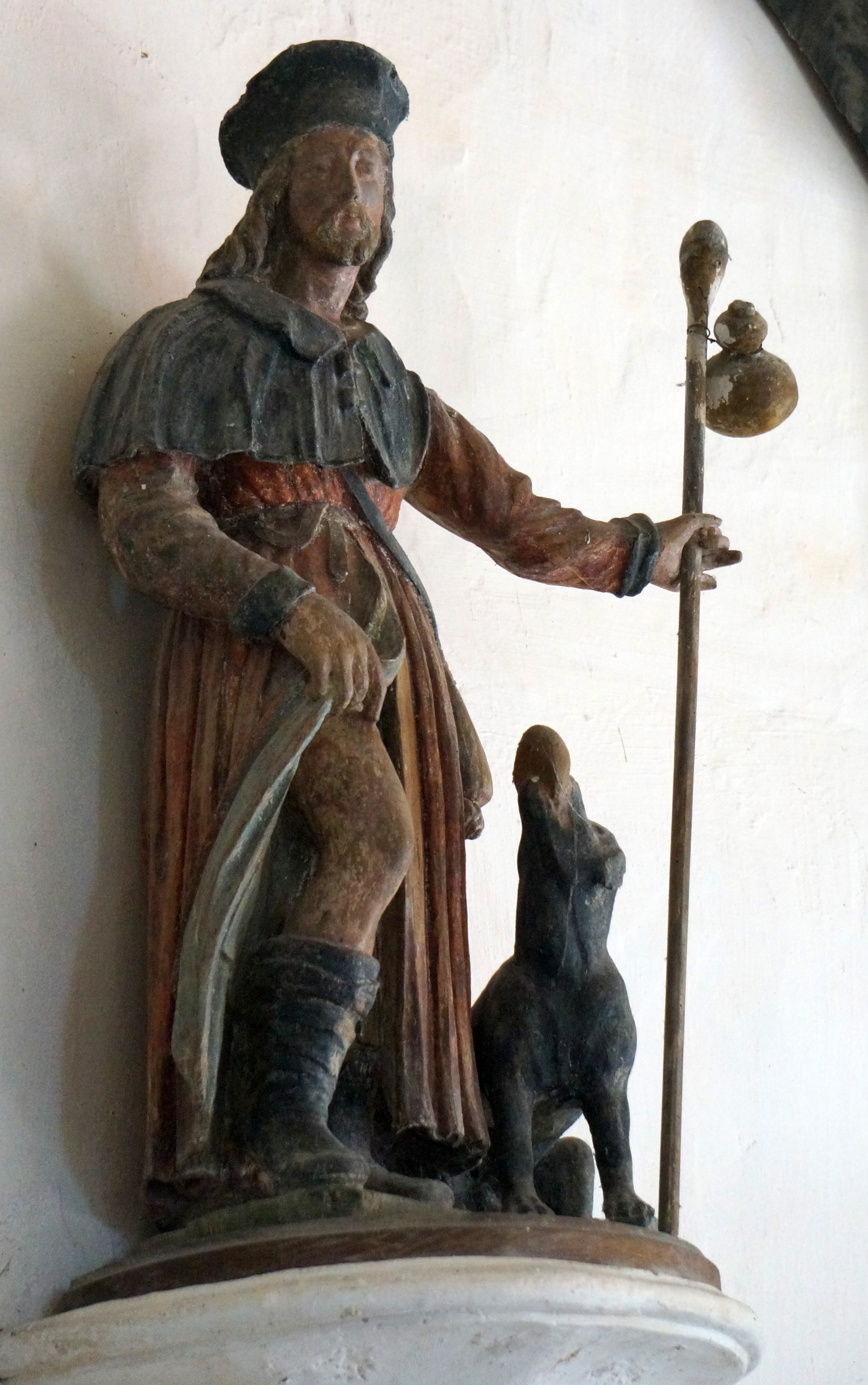 Statue de Saint Roch dans l'église Saint-Pierre et nécropoles